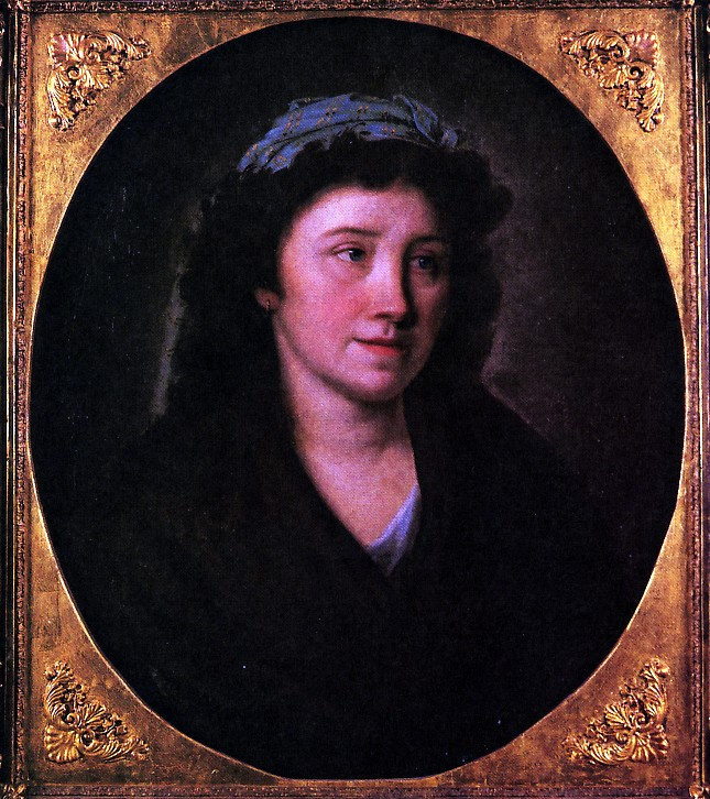 Portrait der deutschen Schriftstellerin Caroline von Wolzogen.